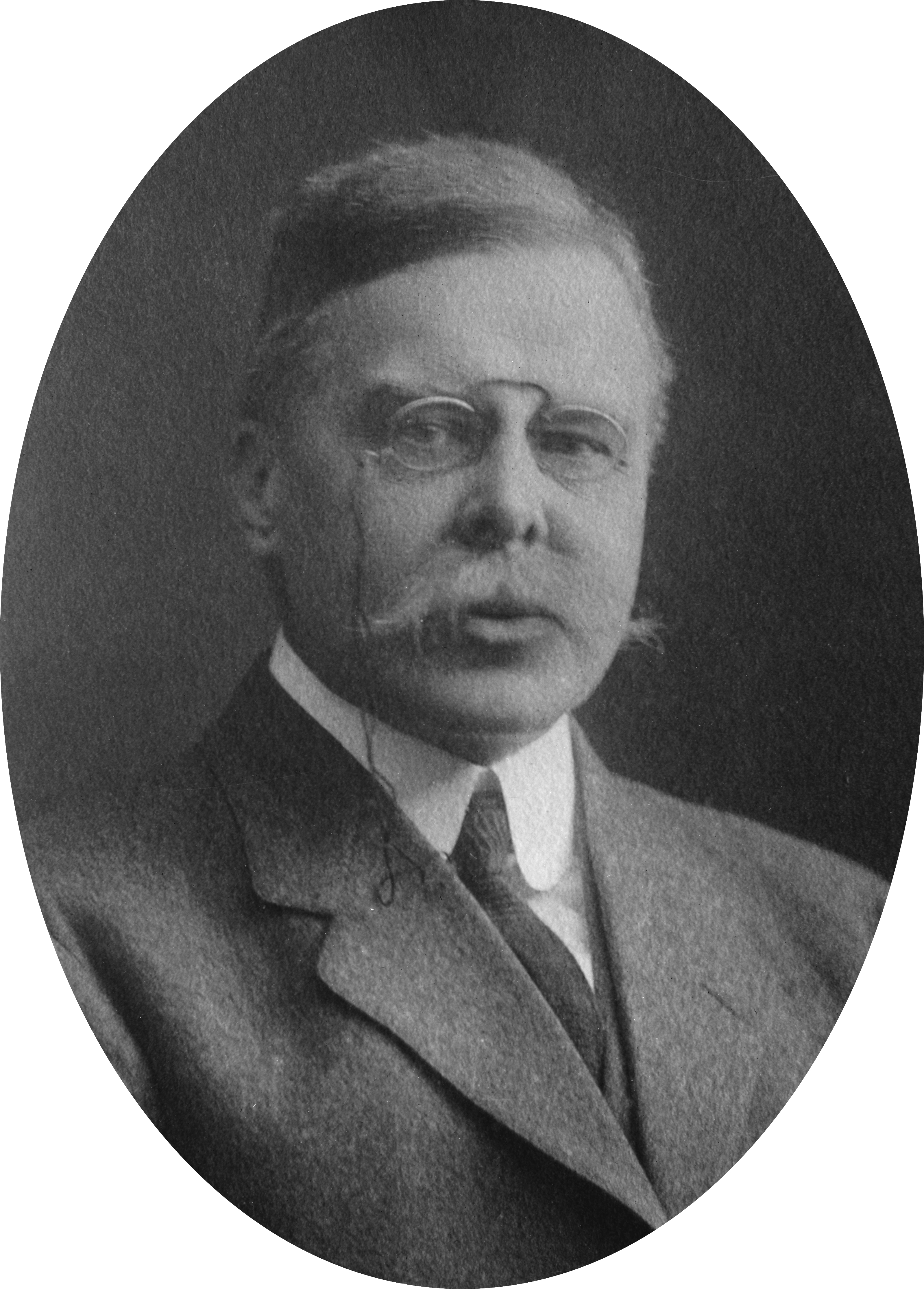 Kuno Francke (1855-1931), Harvard professor